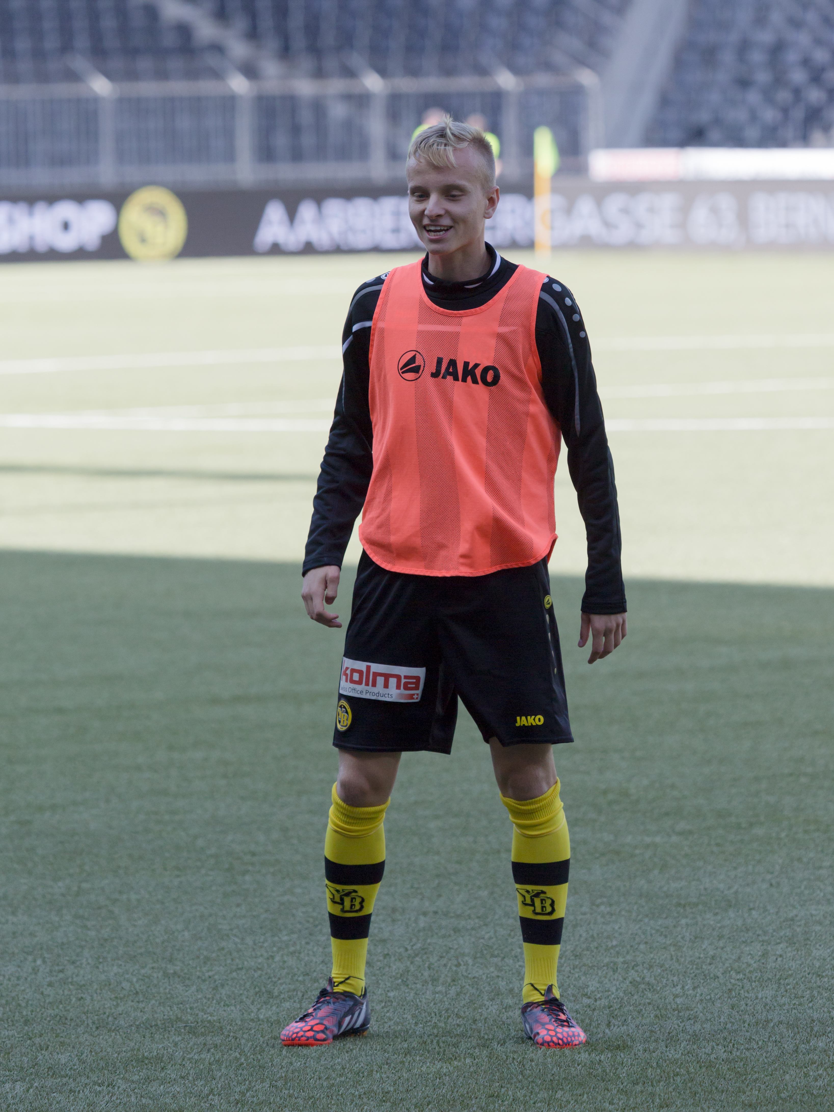 Florent Hadergjonaj beim Spiel des BSC Young Boys gegen den FC Luzern